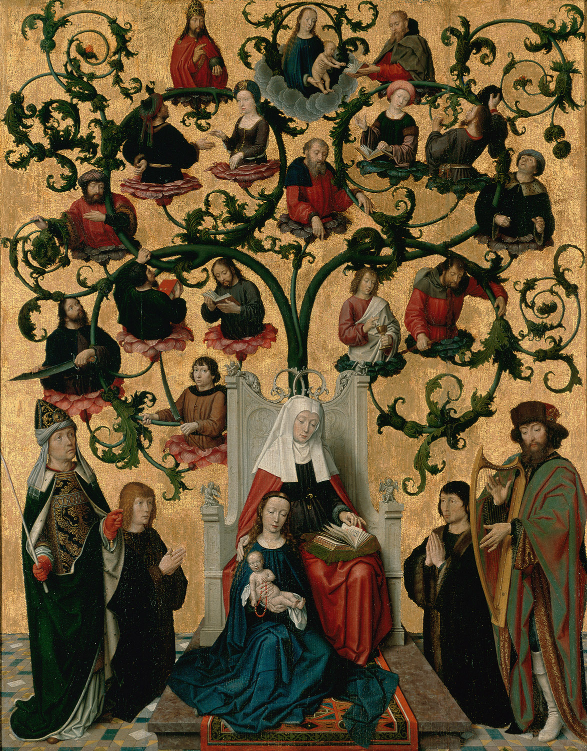 label QS:Lfr,"La Lignée de sainte Anne"